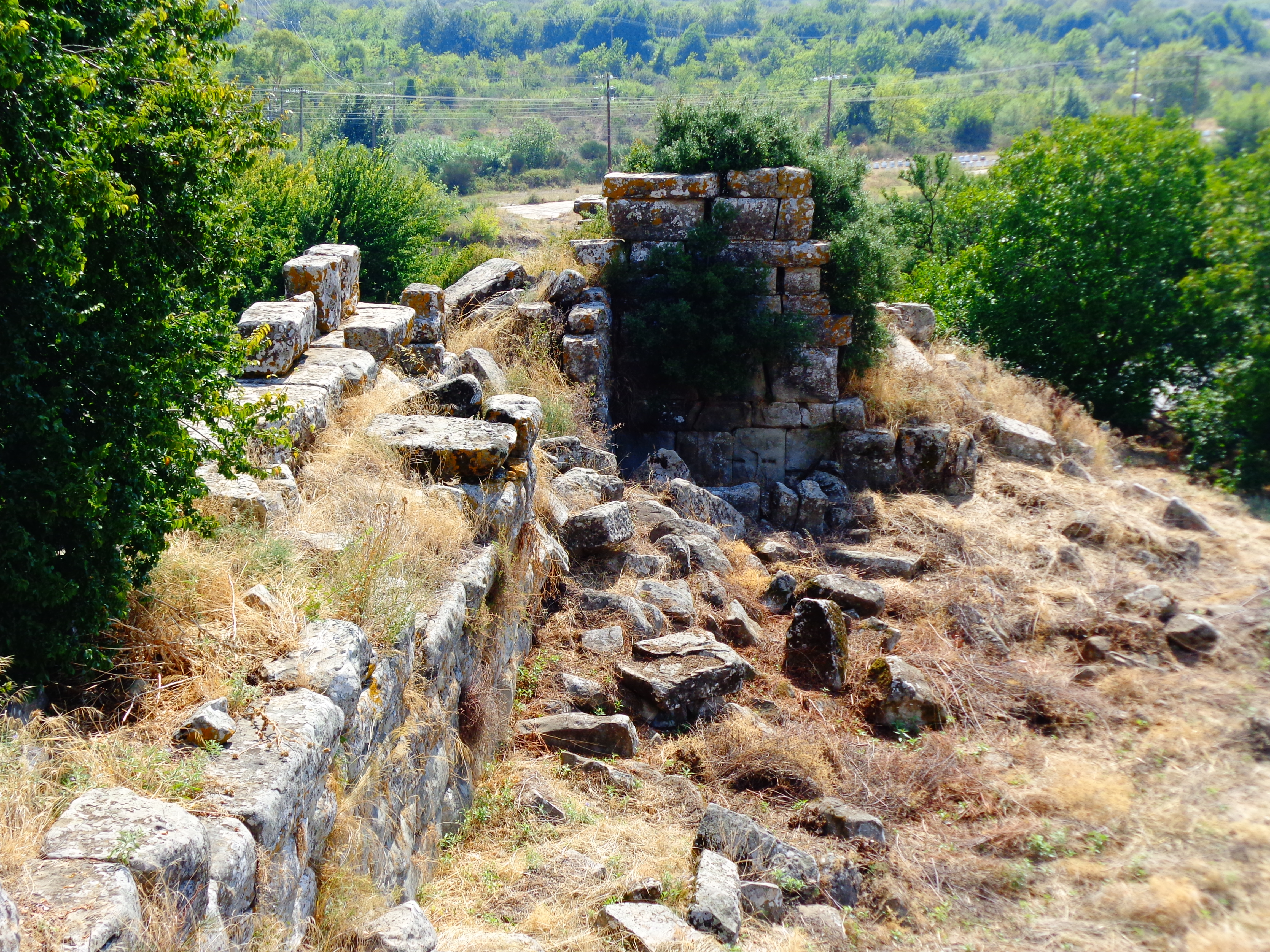 Στράτος«Στράτος»